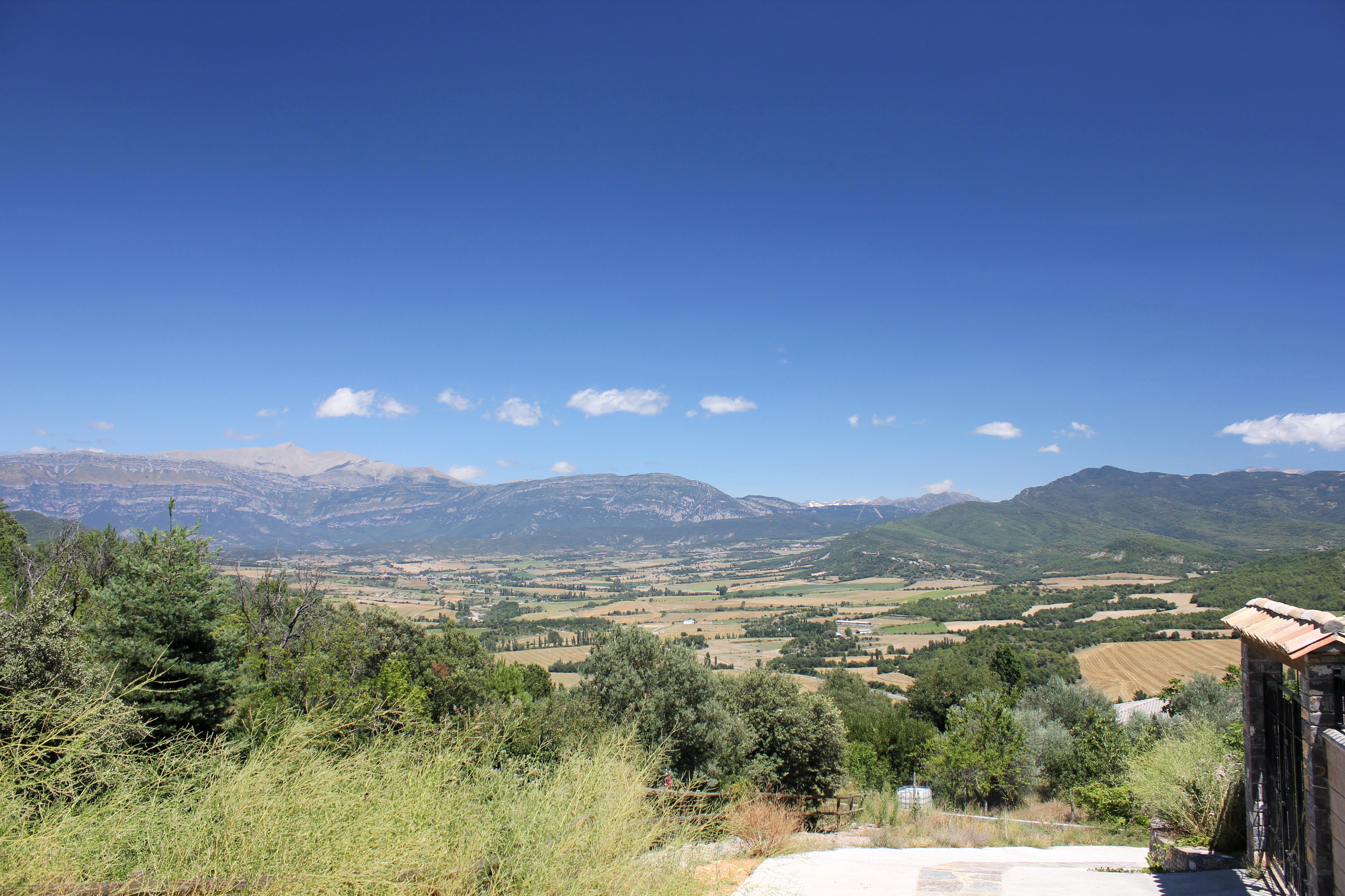 Aragonés: A Fueva dende Palo